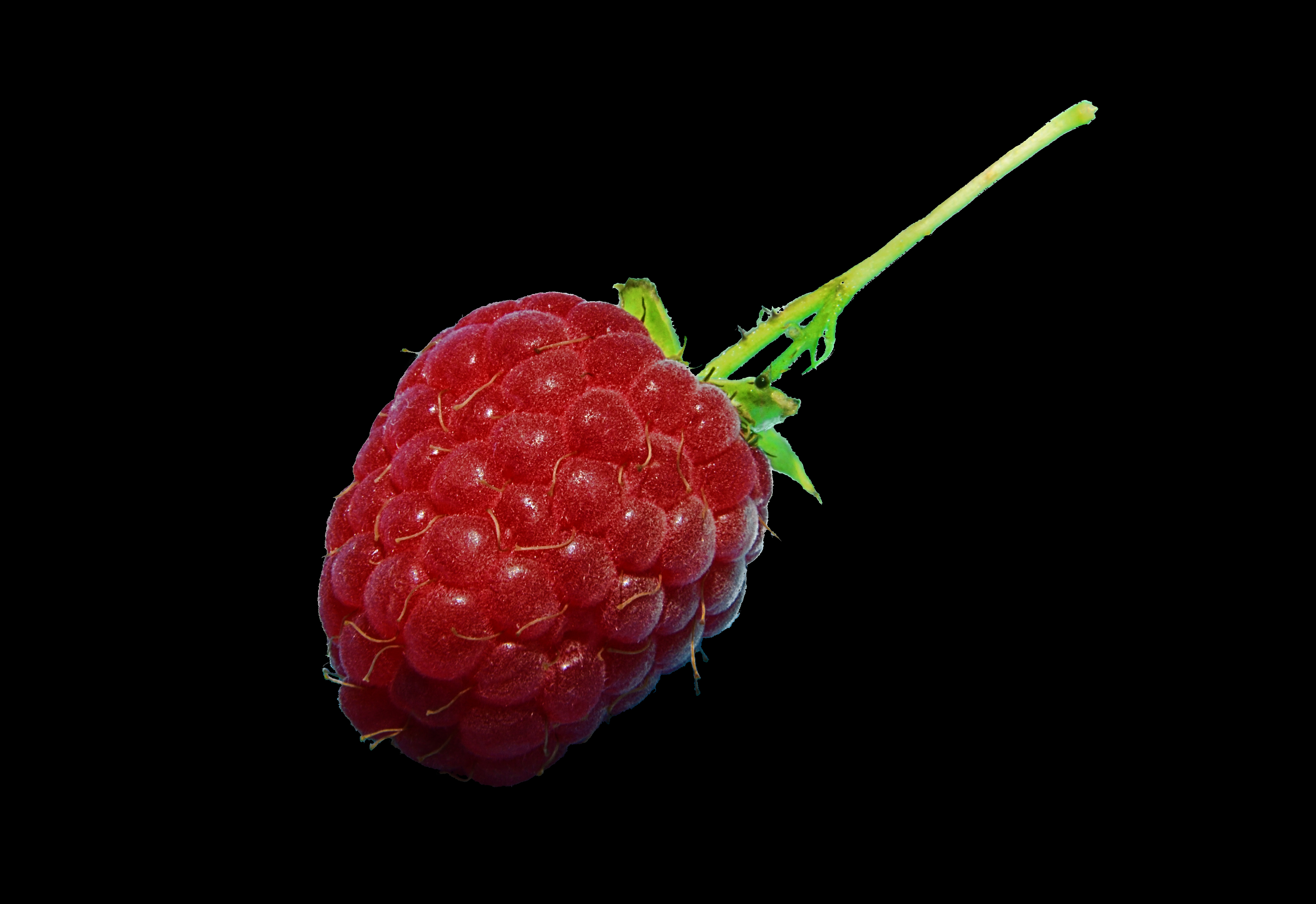 Himbeere vor schwarzem Hintergrund